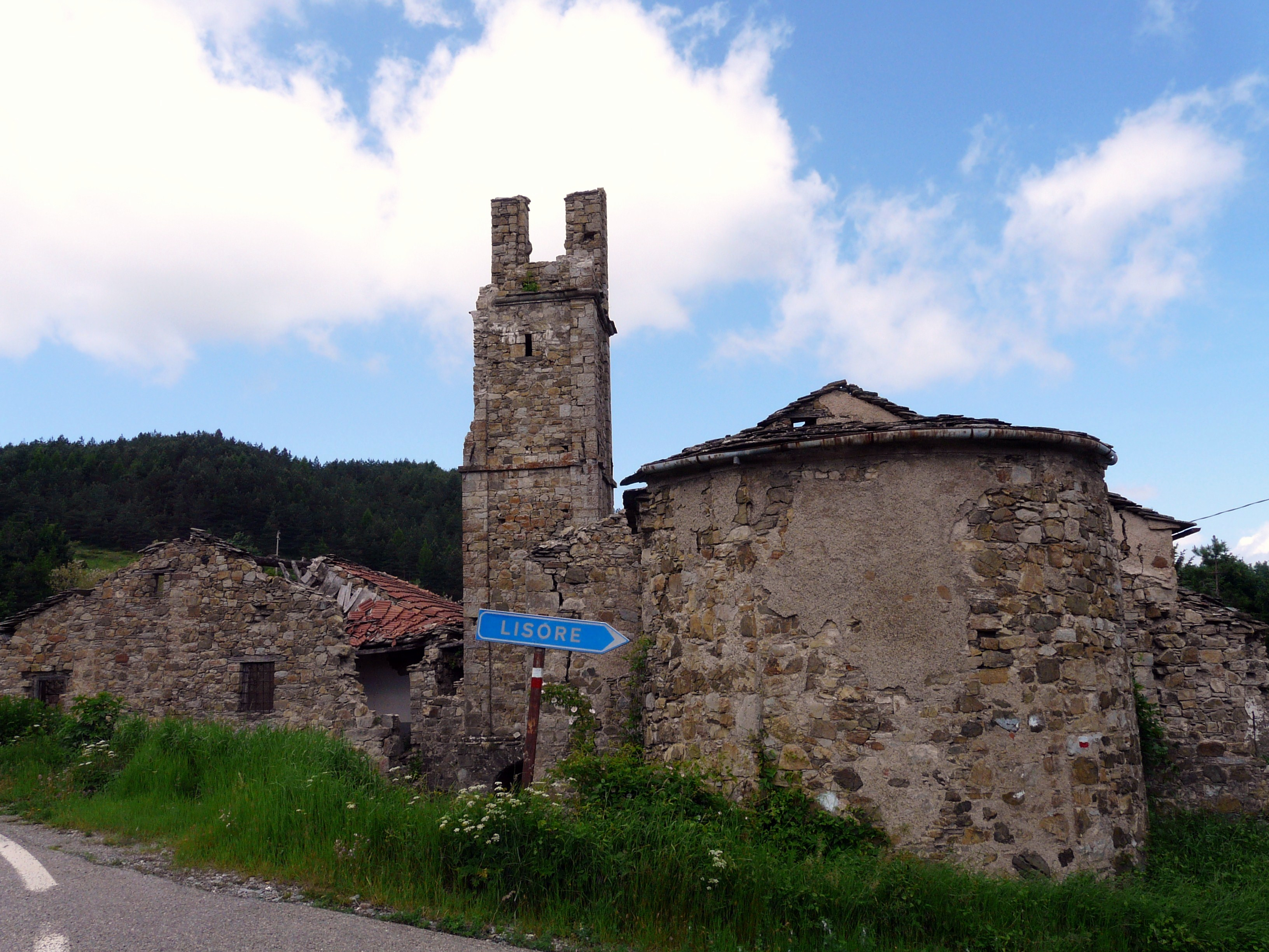 Ruderi della chiesa Invenzione di Santo Stefano a Selva, Cerignale, Emilia-Romagna, Italia